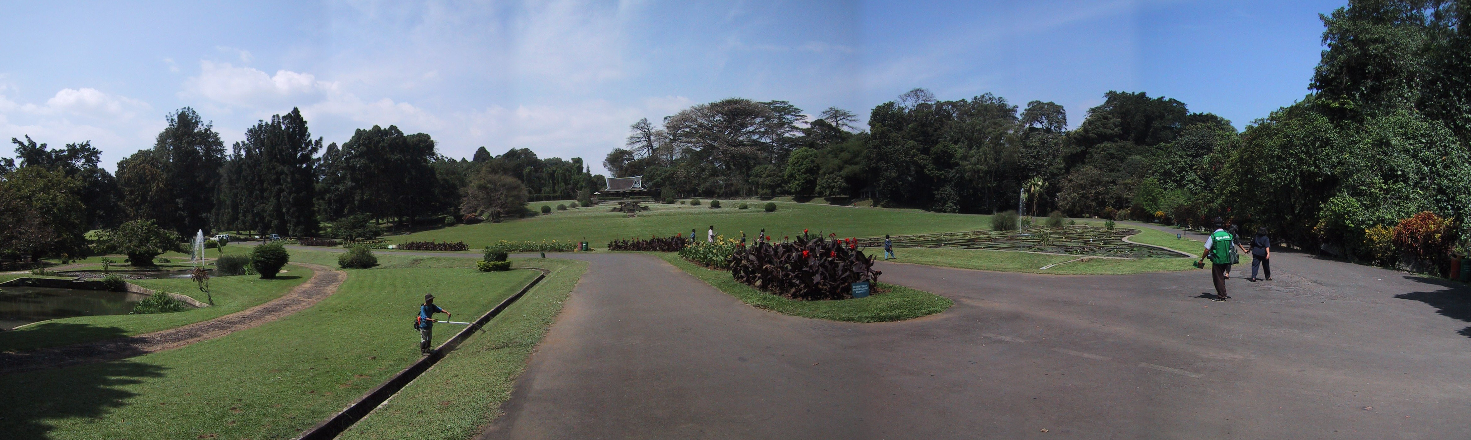 Kebun raya - Bogor - Indonesië